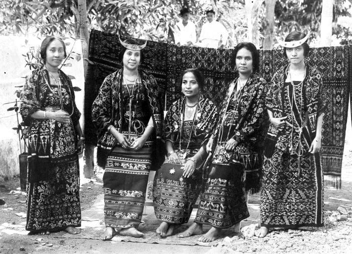 Repronegatief. Vijf vrouwen van Timor in geïkatte feestkleding